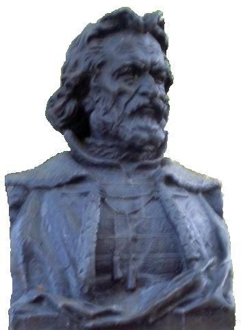 Nicolae Milescu